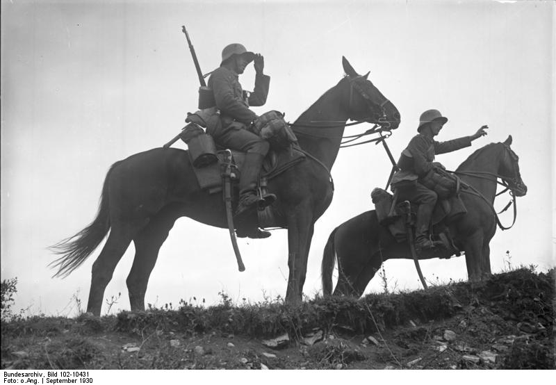 Die grosse Rahmenübung der Reichswehr in Unterfranken in der Gegend Königshofen unter Anwesenheit des Reichspräsidenten von Hindenburg , des Reichswehrministers Dr. Groener und vieler ausländischer Militär-Attaches. - Eine Kavallerie-Vorposten-Patrouille im Manovergelände.